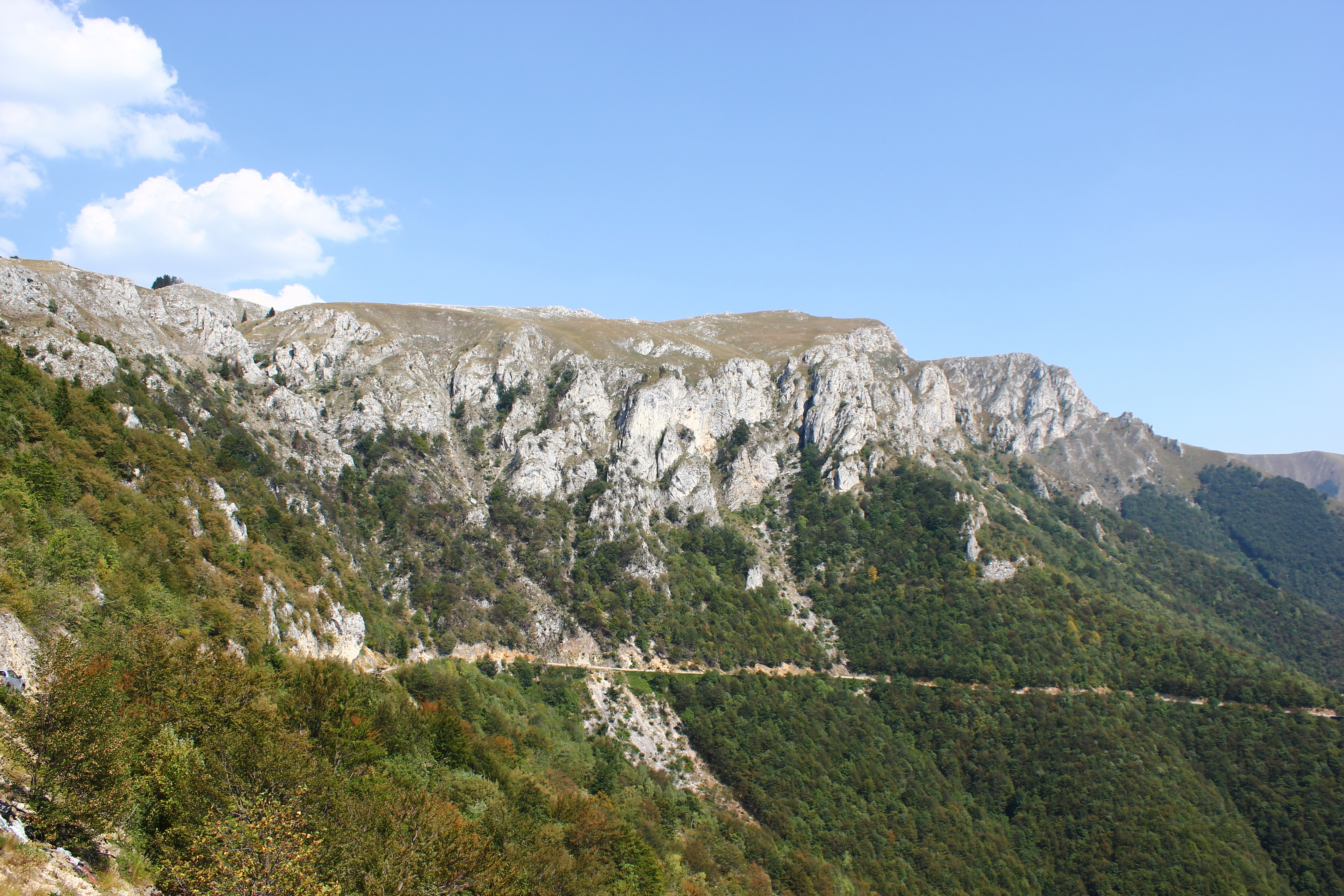 Südwand des Vlašić bei Turbe (Bosnien und Herzegowina).